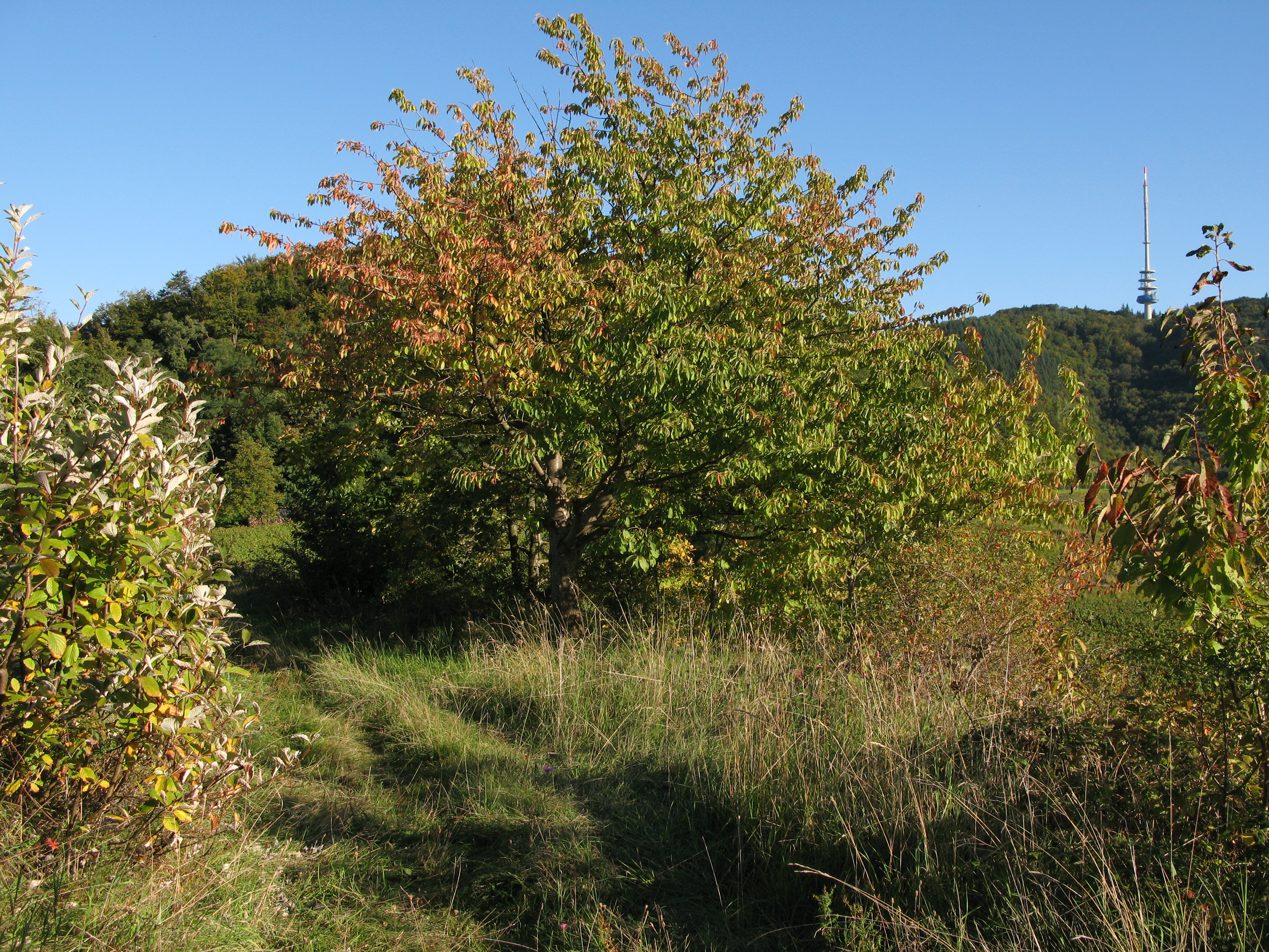 Im Naturschutzgebiet Oberbergener Scheibenbuck im Kaiserstuhl mit Blick zum Turm auf dem Totenkopf.